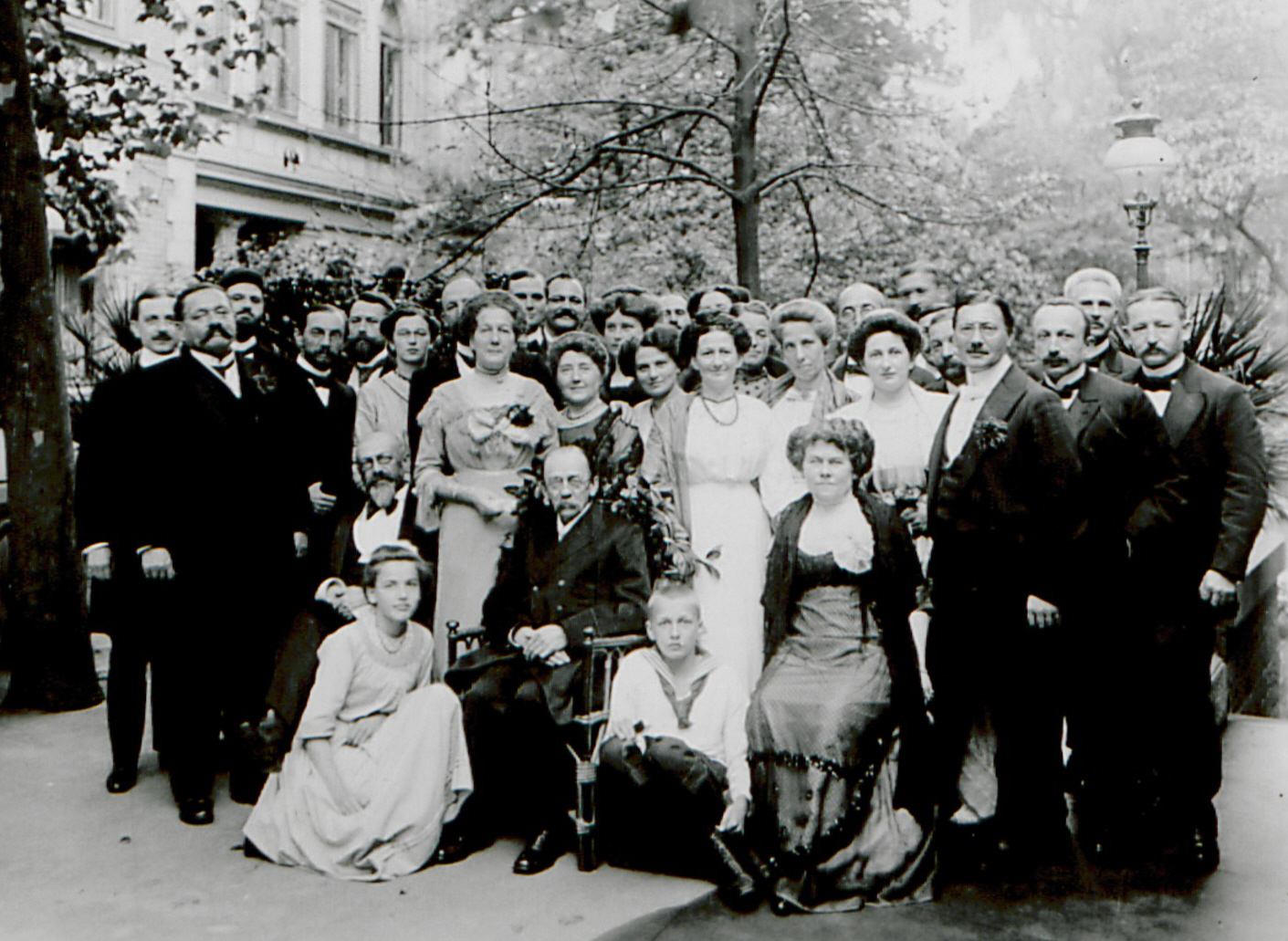 Heidelberg - 70. Geburtstag von Jannasch Stehend v.l.n.r: Ernst Muckermann (*15.11.1874) Theodor Curtius (* 27. Mai 1857 in Duisburg; † 8. Februar 1928 in Heidelberg) August Darapsky (* 3. Mai 1874 in Mainz; † 26. April 1942 in Aschaffenburg) stehend, 9./10. v.l.: Hartwig Franzen (* 21. März 1878 in Nortorf; † 14. Februar 1923 in Karlsruhe) Otto von Mayer (* 13.11.1872) .... .... August Klages (* 19. Juni 1871 in Hannover; † 27. Dezember 1957 in Göttingen) Georg Bredig (* 1. Oktober 1868 in Glogau; † 24. April 1944 in New York) Emil Knoevenagel (* 18. Juni 1865 in Linden bei Hannover; † 11. August 1921 in Berlin) Johannes Rissom (1868-1954) sitzend Robert Stollé (1869-1938) Paul Jannasch (* 2. Oktober 1841 in Deutsch-Ossig/Görlitz; † 20. März 1921 in Heidelberg)[1]